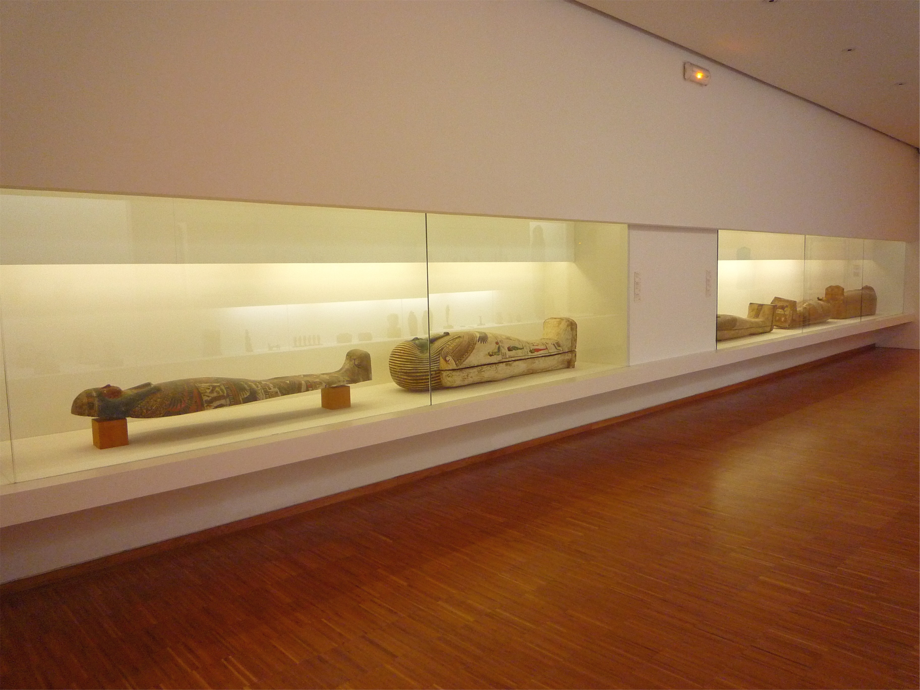 Sarcophages en salle d'Egyptologie, Musée de Grenoble